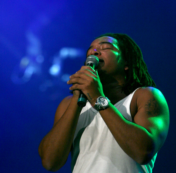 Virgul. Concerto no Pavilhão Atlântico dos Da Weasel. 10 de Novembro 2007